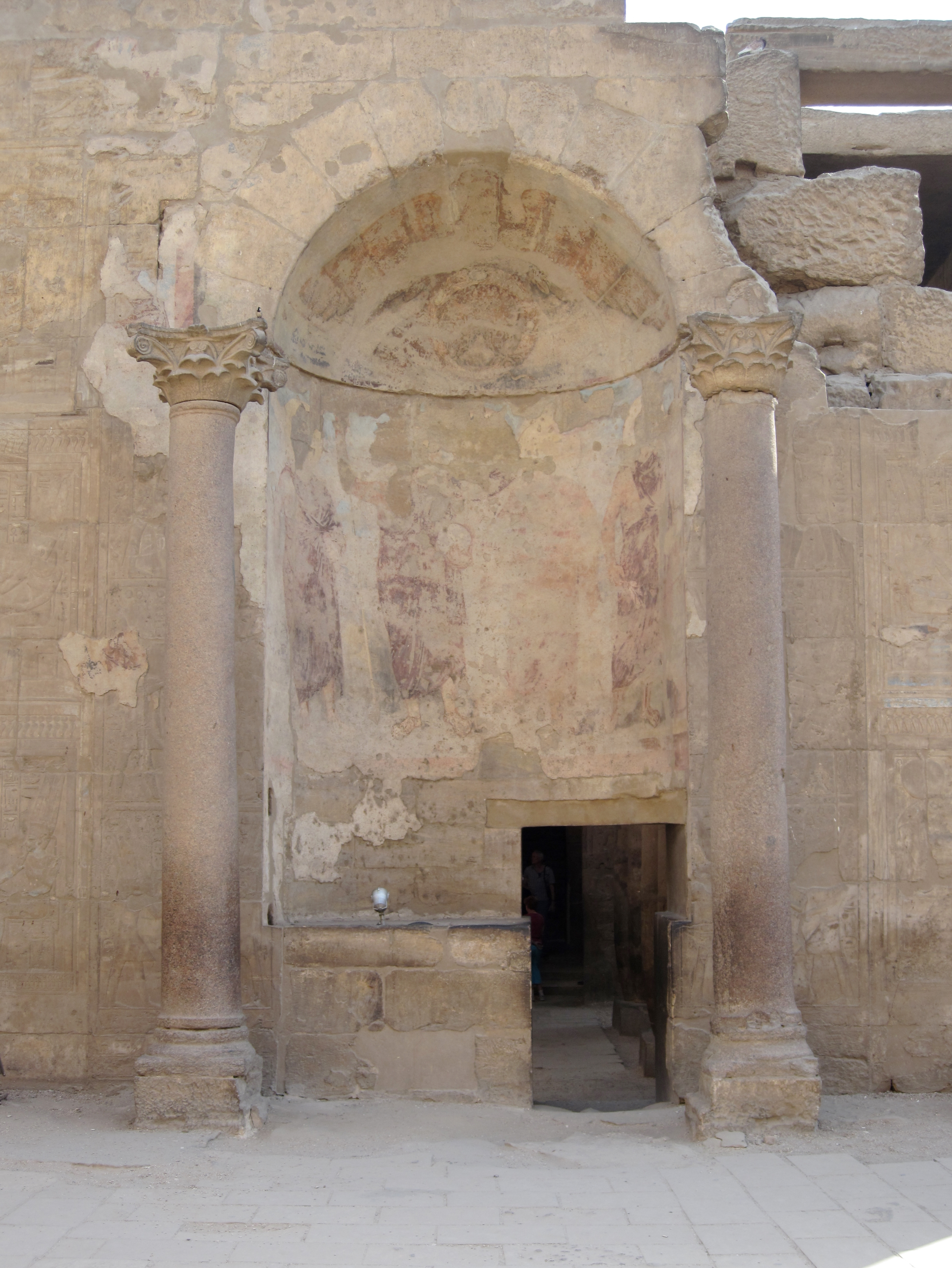 Fresken im Inneren des Tempels von Luxor, Ägypten